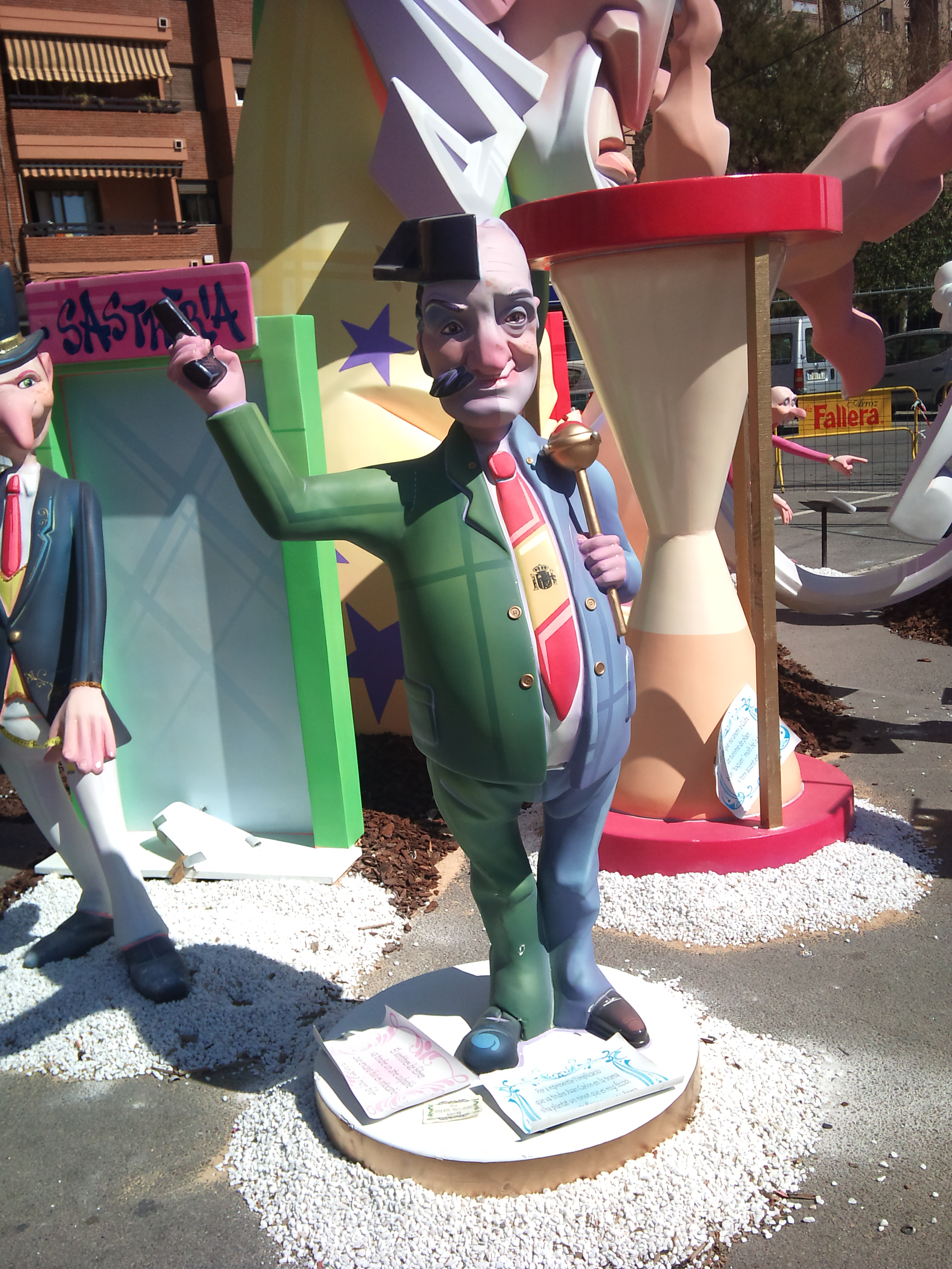 Ninot paròdic